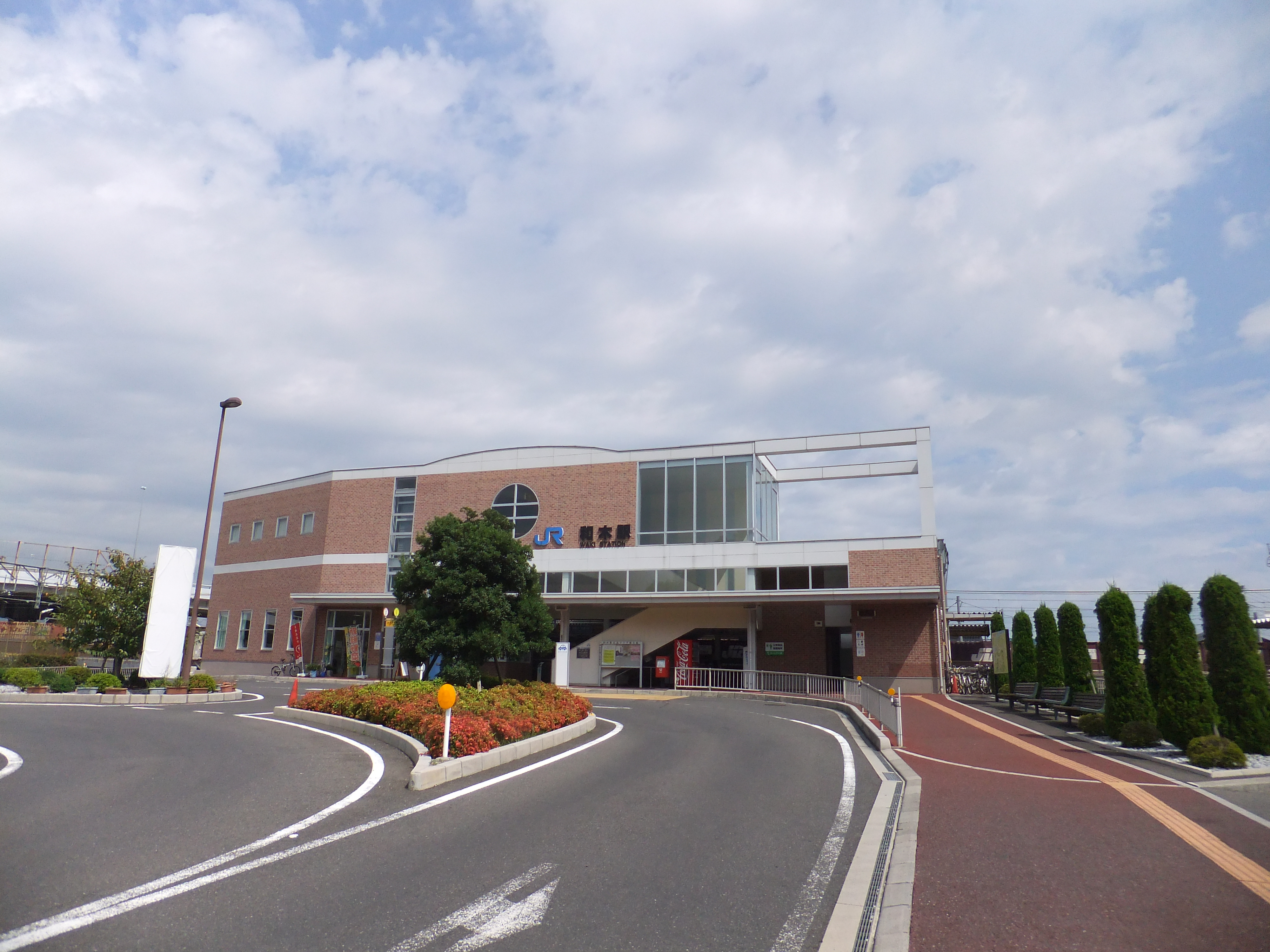 和木駅